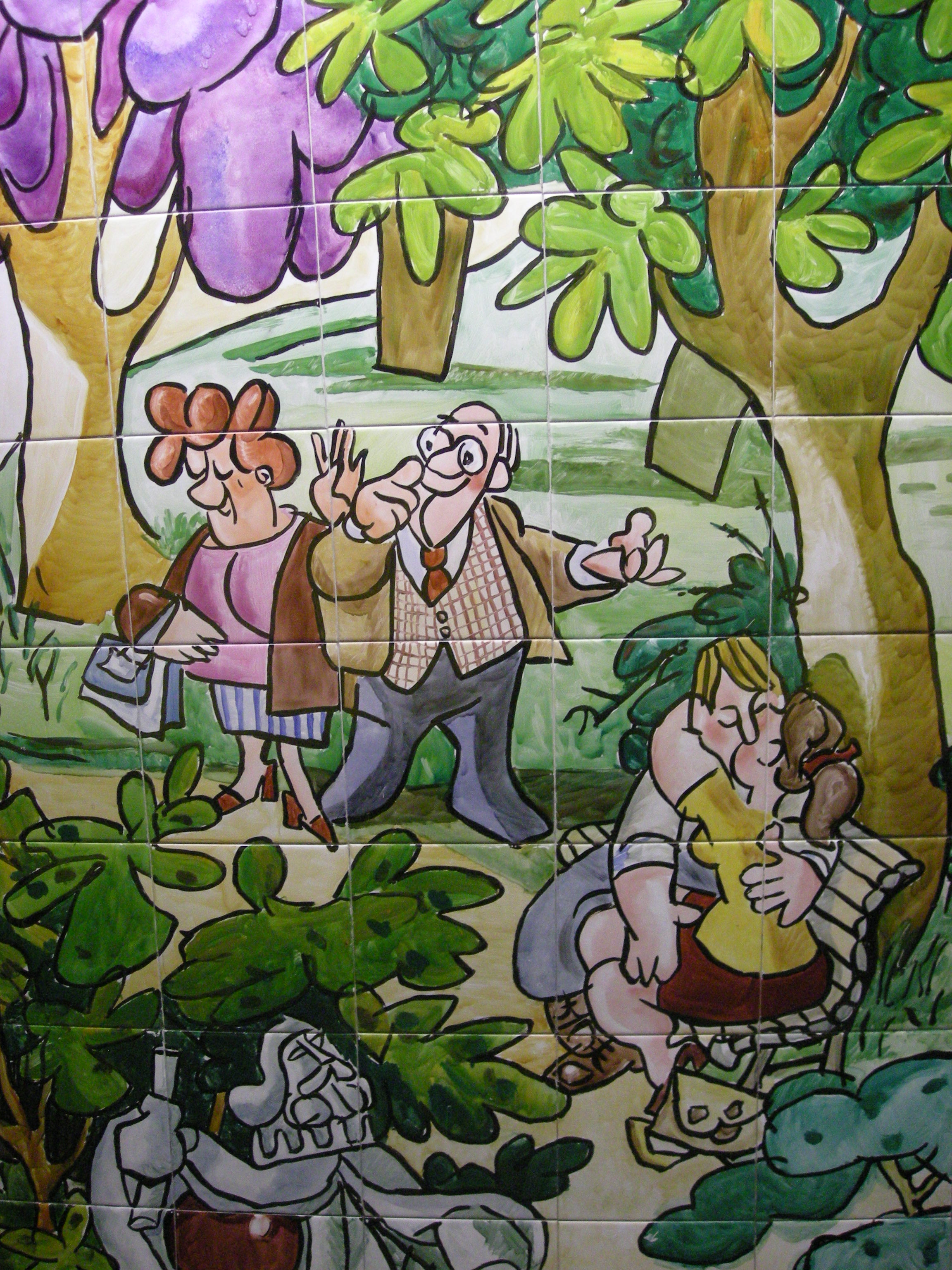 Mural de Antonio Mingote; Estación de Metro de Retiro, Madrid, España.